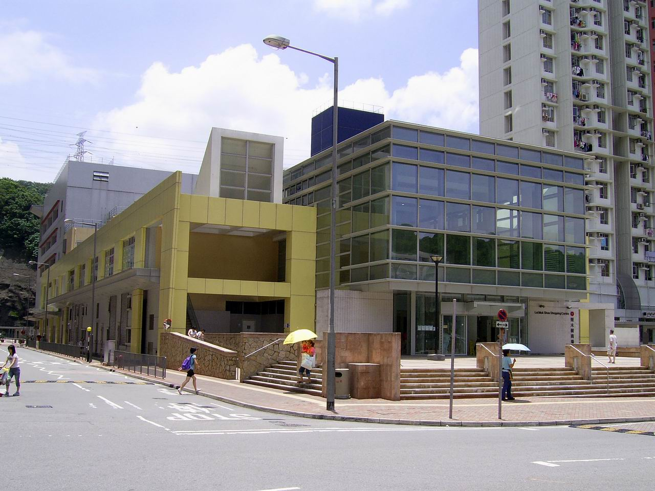 中文（香港）: 梨木樹商場